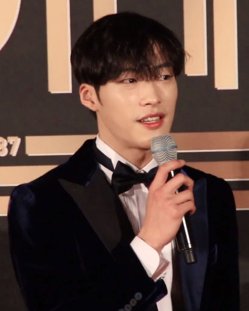 2017 KBS연기대상 레드카펫 '매드독' 우도환